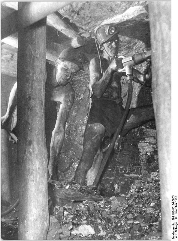 Zwickau, Zeche "Martin Hoop", Bergarbeiter bohrend Zentralbild Schlegel A.v. 2337 6.12.1957 7.12.1957 Wismut-Kumpel helfen Steinkohlen-Bergarbeitern In ihrem Kampf um die höchsten Förderergebnisse werden die Bergarbeiter in den Steinkohlenschächten des Zwickauer Reviers von Arbeitern der SDAG Wismut vermitteln ihren Berufskollegen wertvolle Erfahrungen bei der Organisation von Wettbewerben, Produktionsberatung und bei der Anwendung neuer Methoden zur Verbesserung der Arbeit. UBz: Im VEB Steinkohlenwerk "Martin Hoop" in Zwickau arbeiten u.a. die Kollegen Martin Brückner und Günther Döring vom Wismut-Objekt Oberschlema.